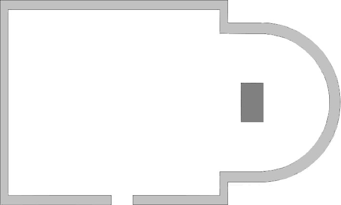 Burgheimer Kirche, erste Bauphase